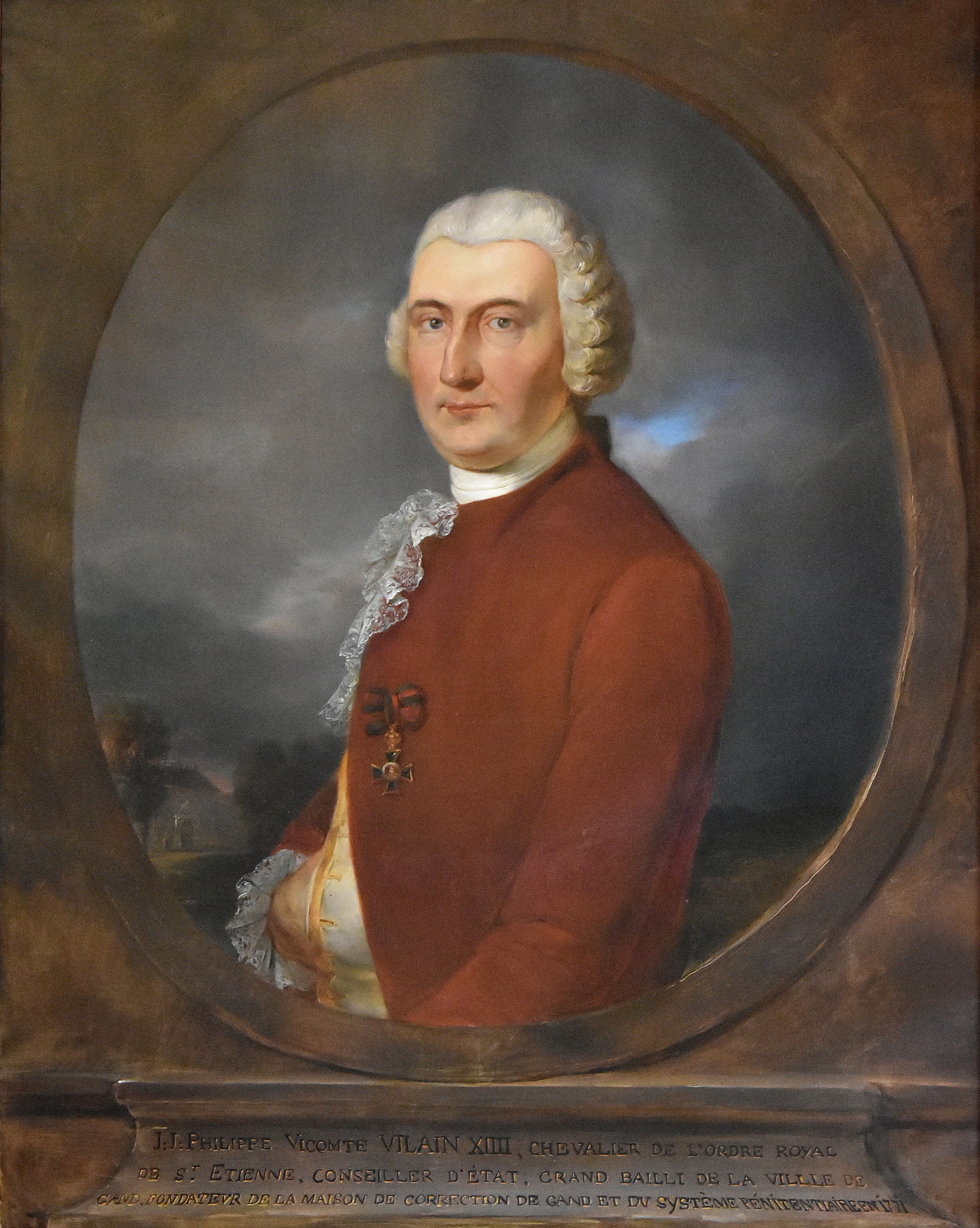 E. Van den Bussche (onbekend) Jean Jacques Vilain XIIII Kasteel Wissekerke